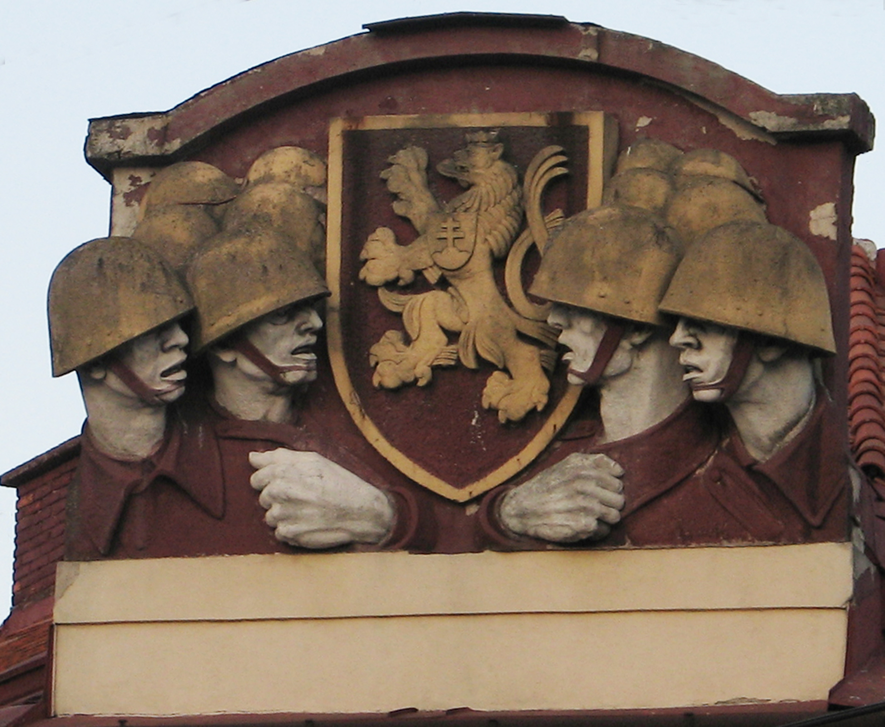 Bratislava, Kollárovo námestie. Reliéf na budove od Ladislava Majerského, z 30. rokov